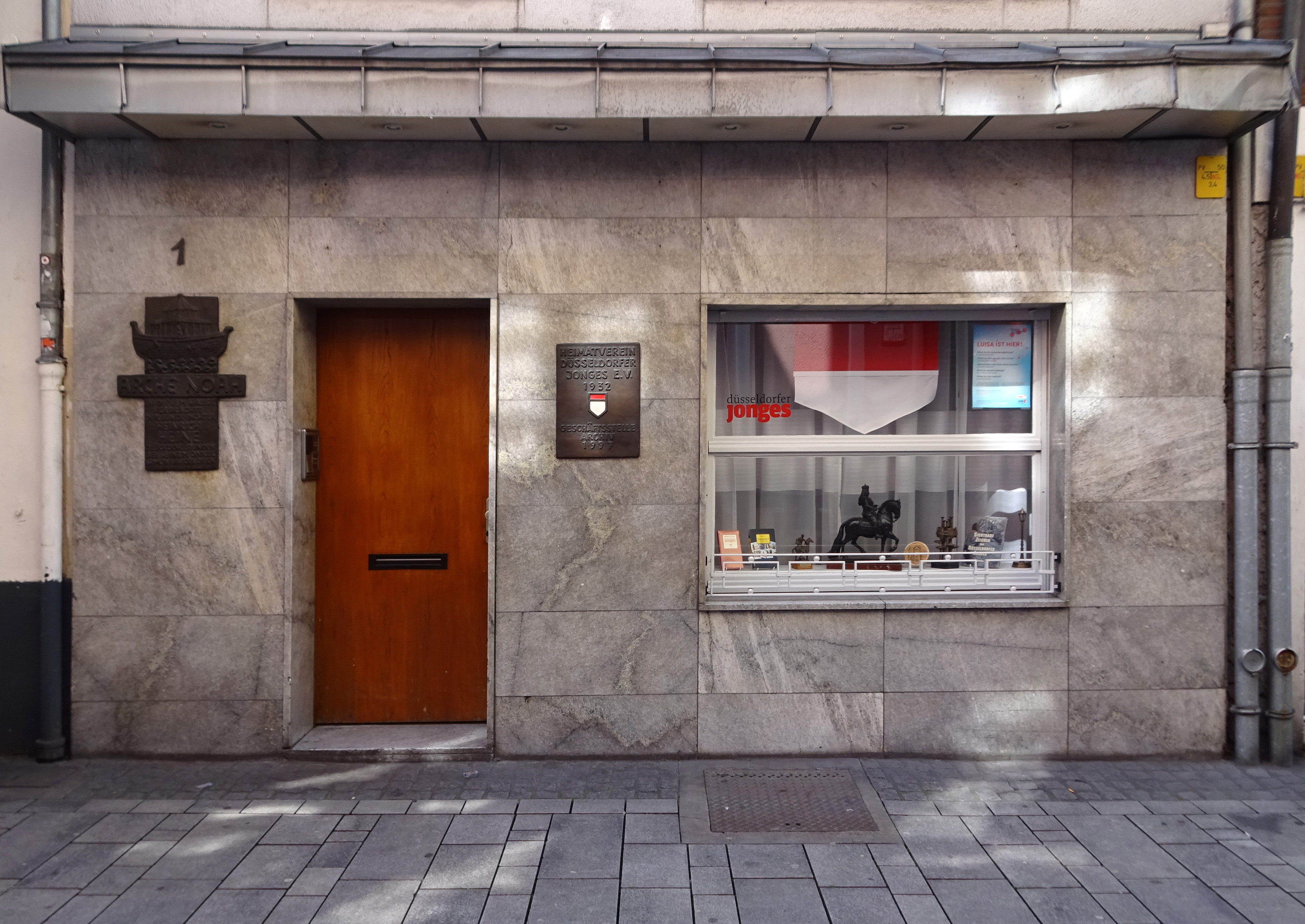 Heimatverein Düsseldorfer Jonges e. V., Mertensgasse 1, Düsseldorf-Altstadt